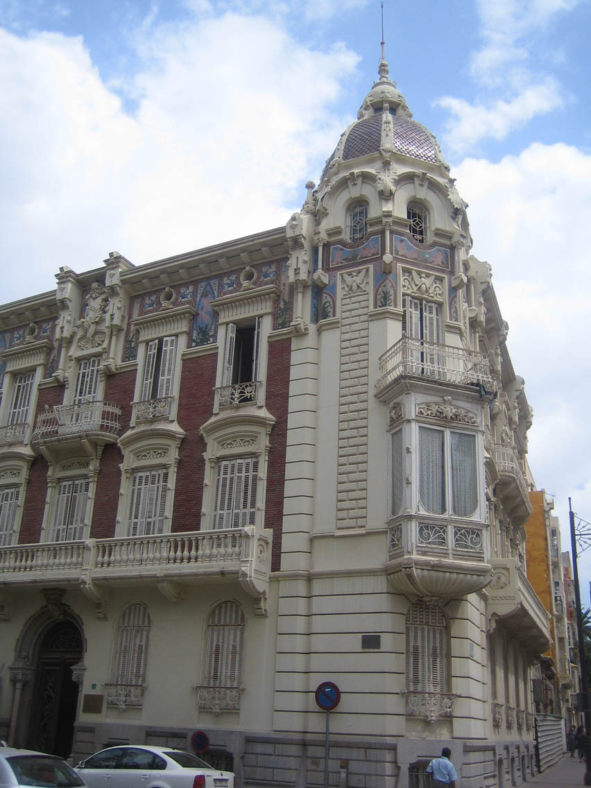 Palacio de Aguirre de Cartagena. Obra del arquitecto Víctor Beltrí de 1898.